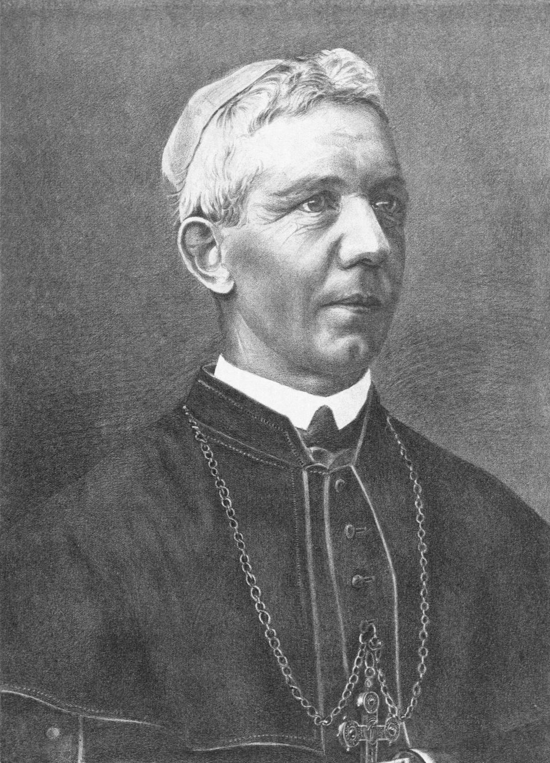 Porträt von Augustin Egger, Bischof von St. Gallen